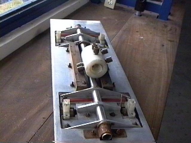 Prototipo 2 del TELMAG